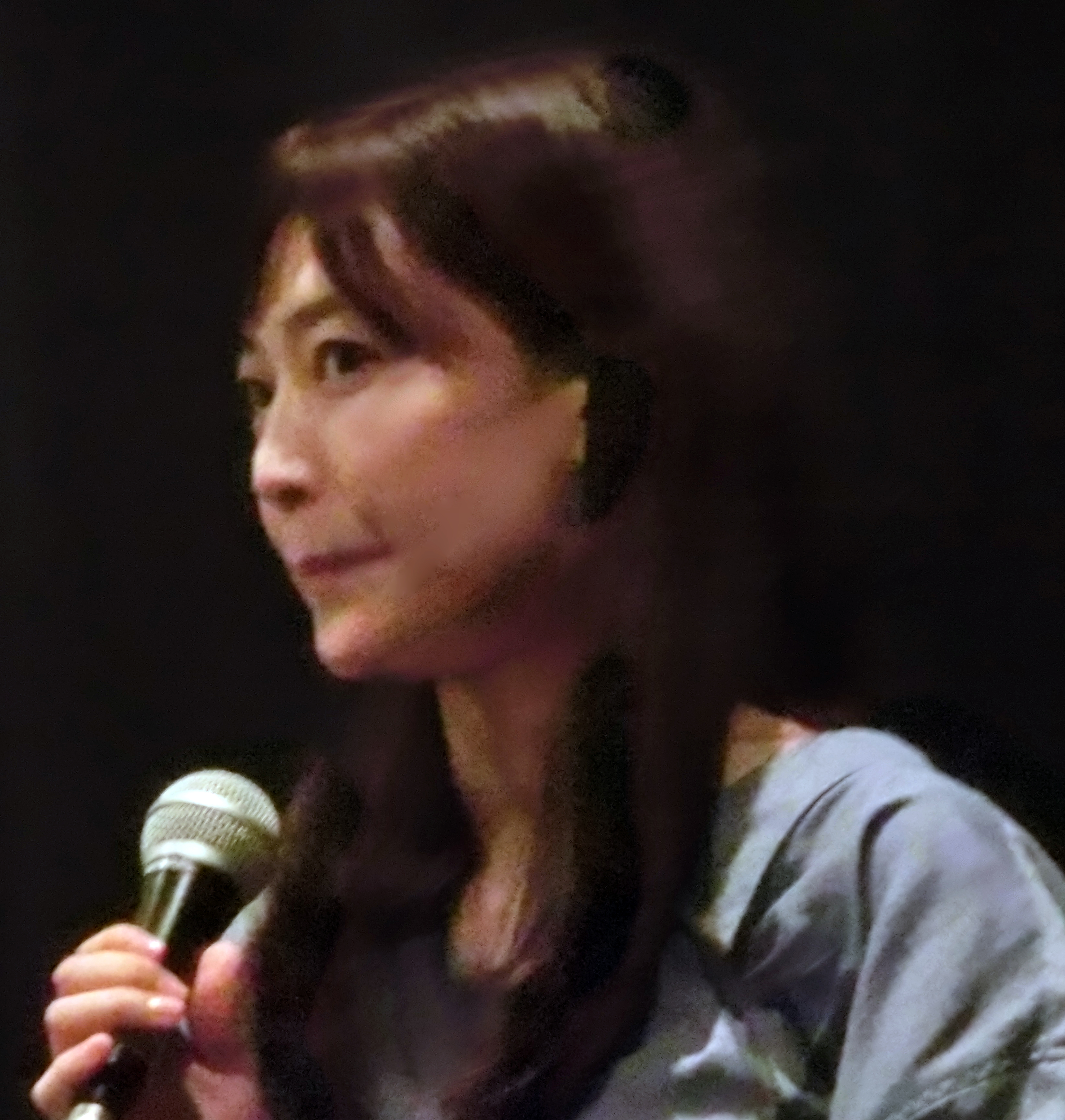 2019年7月22日、上野オークラ劇場・舞台挨拶